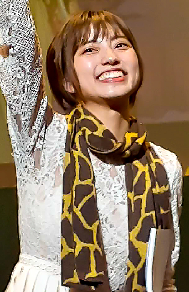 2020年2月13日、新木場スタジオコーストにて撮影。